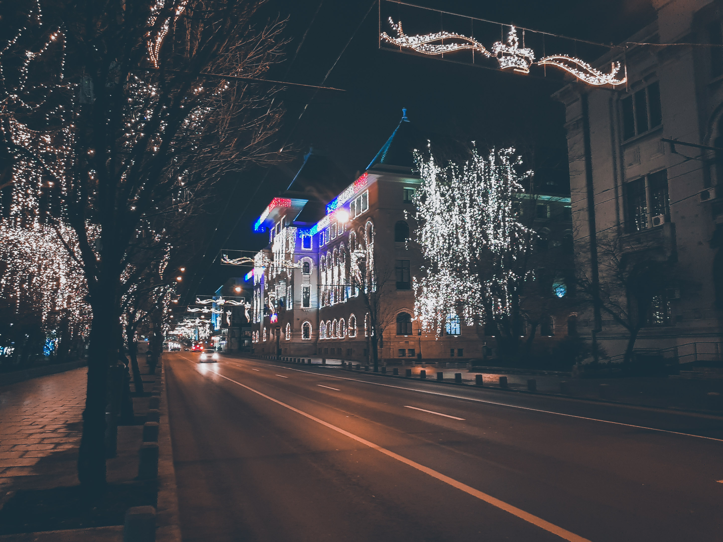 Primaria București (b-dul Elisabeta) de sărbători, 2018.